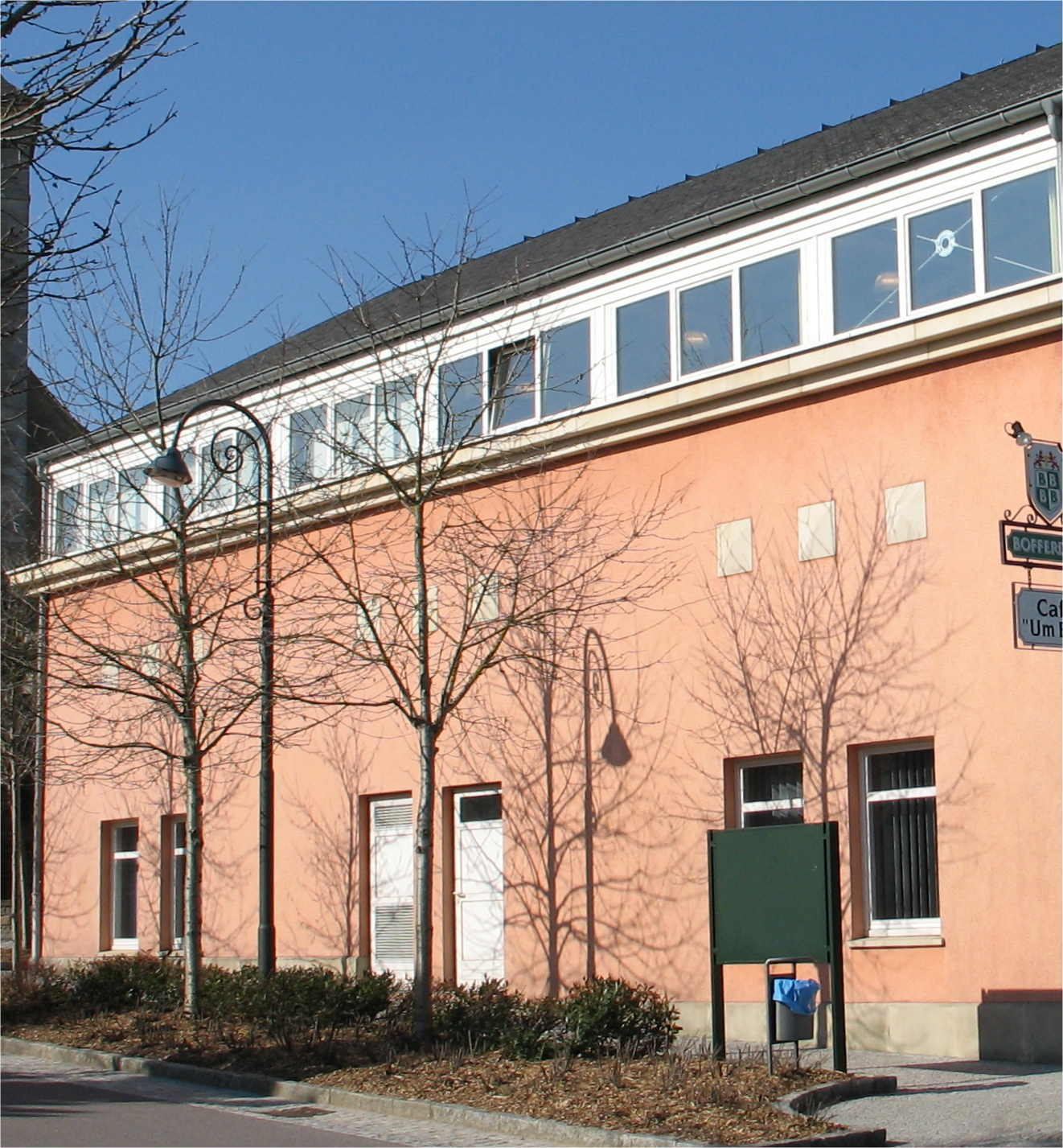 De Centre Culturel vu Betten op der Mess